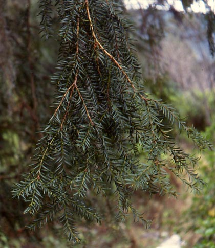 Taxus globosa foliage. Northeast slopes of Cerro Peña Nevada, Nuevo León, Mexico.